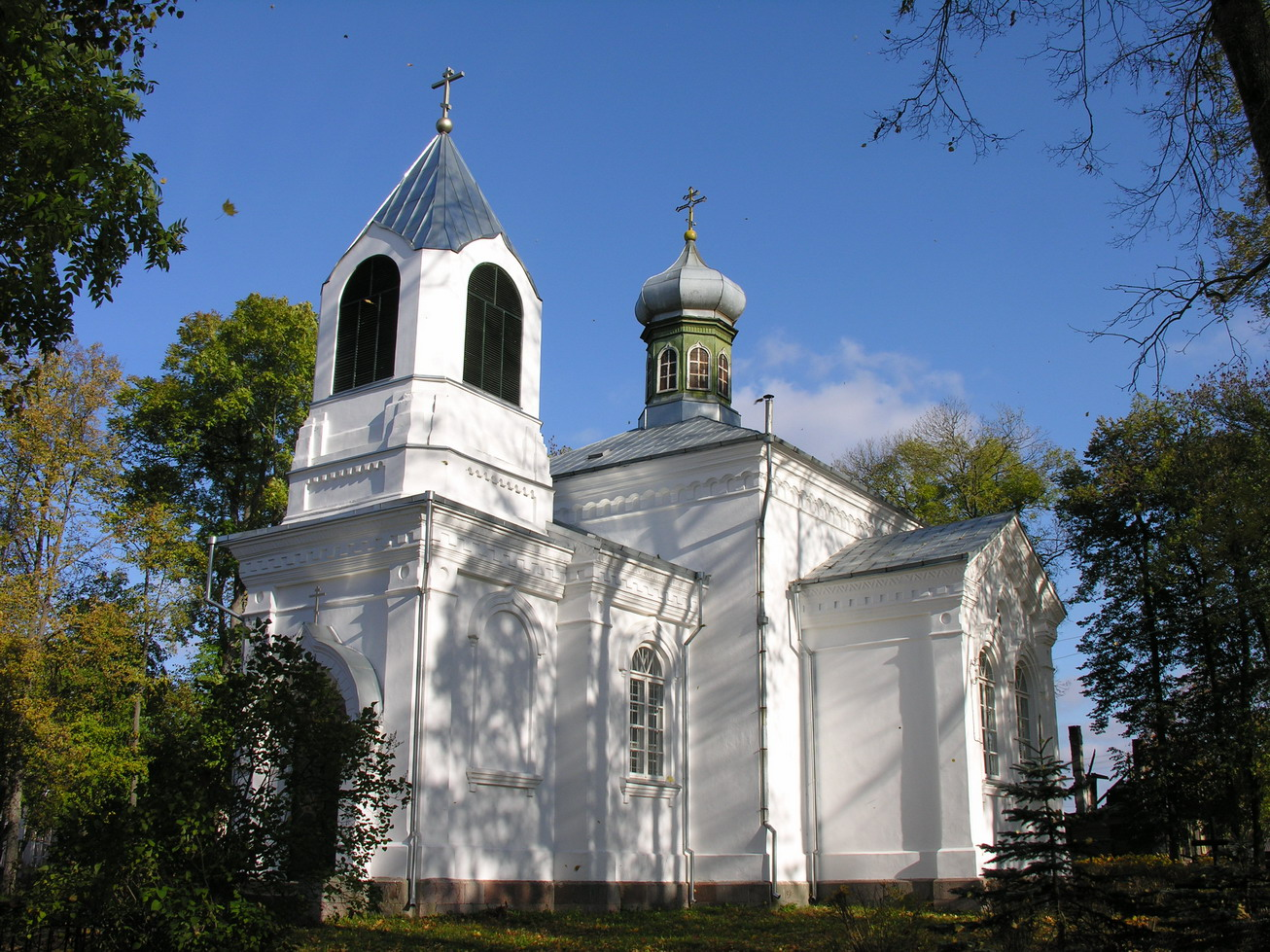 Viekšnių cerkvė, Mažeikių raj. Foto: Algirdas, 2005 m. spalio 20 d.